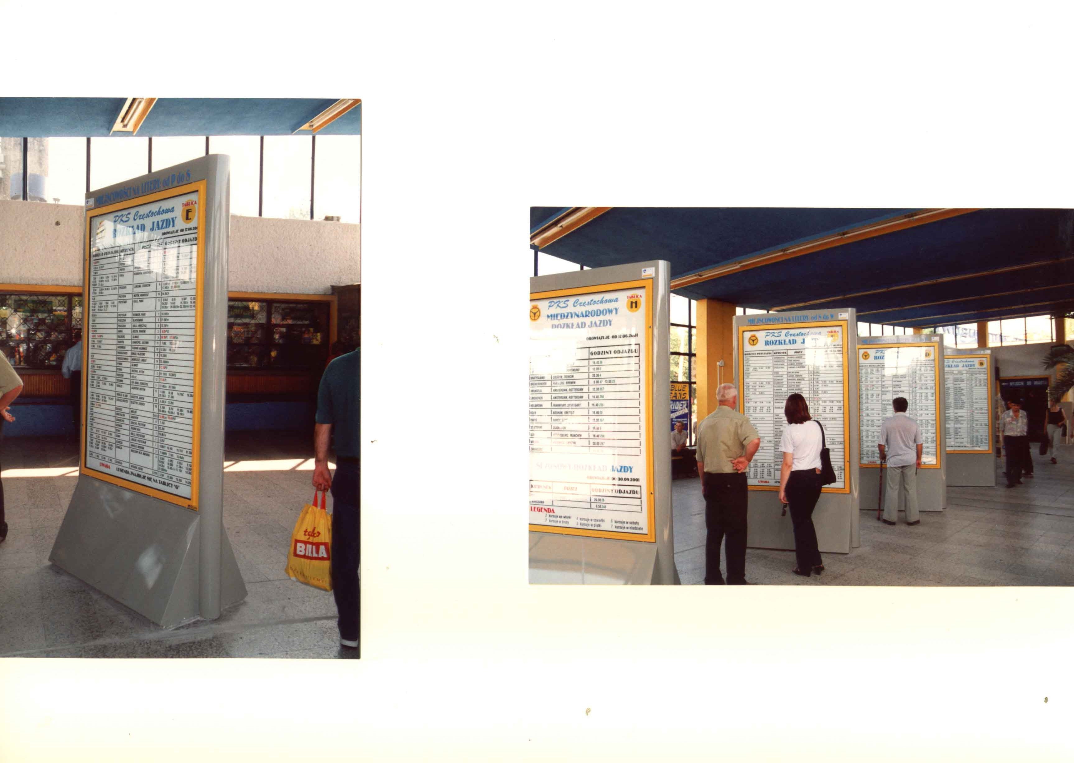 Budotechnika. Gabloty wolnostojące z rozkładami jazdy w Częstochowie